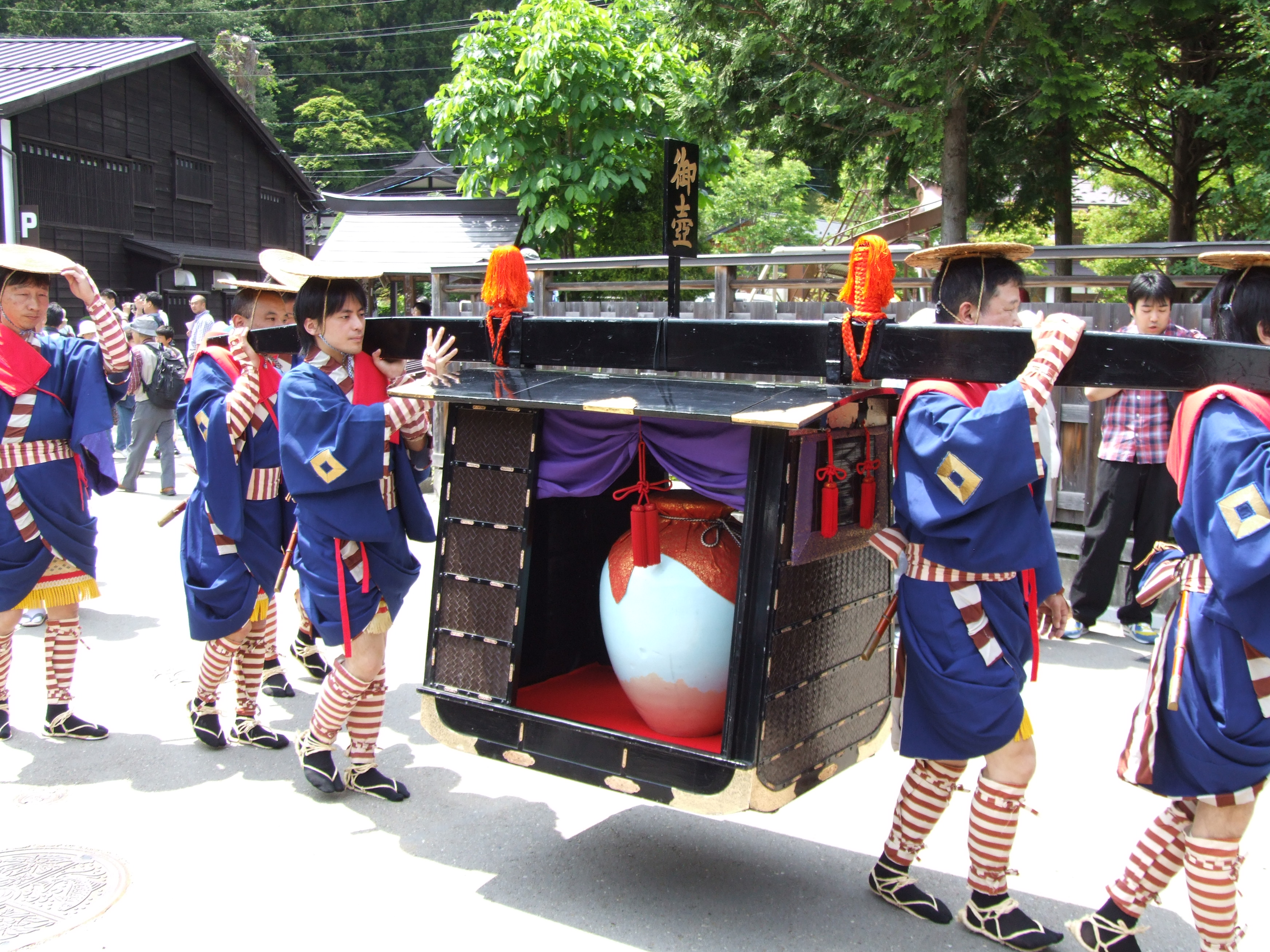 御壺